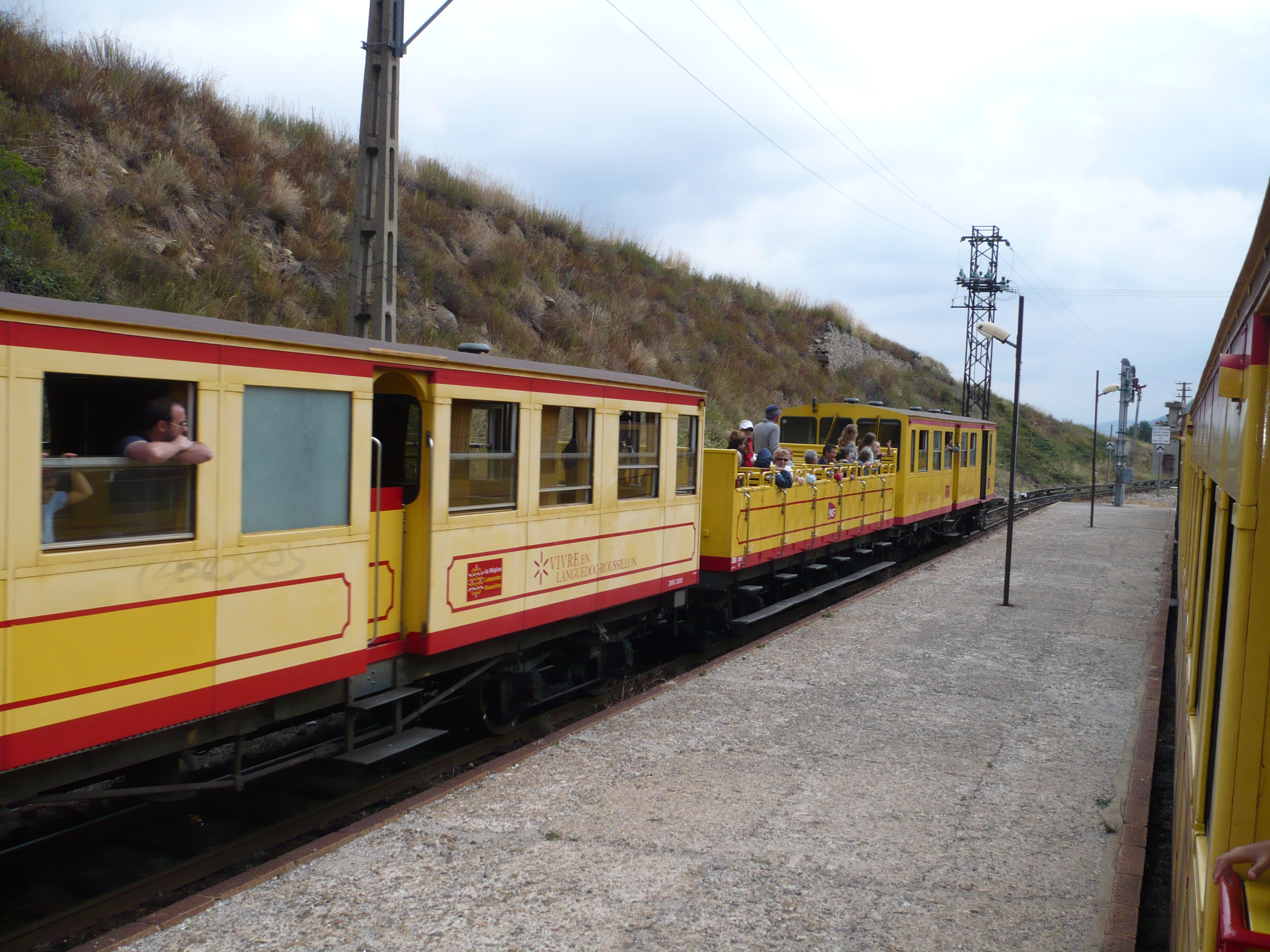 66360 Serdinya, France